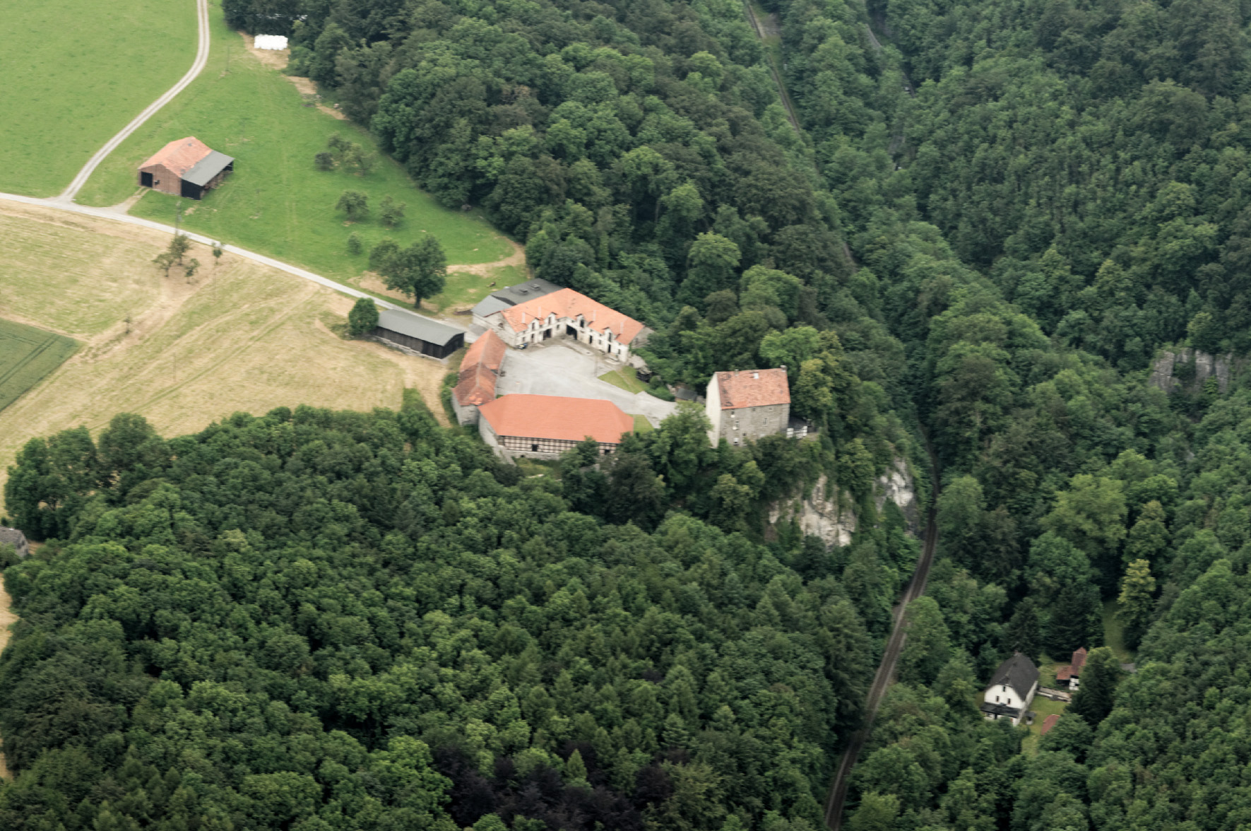 Fotoflug Sauerland Nord. Hemer, Hönnetal mit Hönnetalbahn, Burg Klusenstein, Klusensteiner Mühle, Naturschutzgebiet Hönnetal The making of this document was supported by the Community-Budget of Wikimedia Germany.